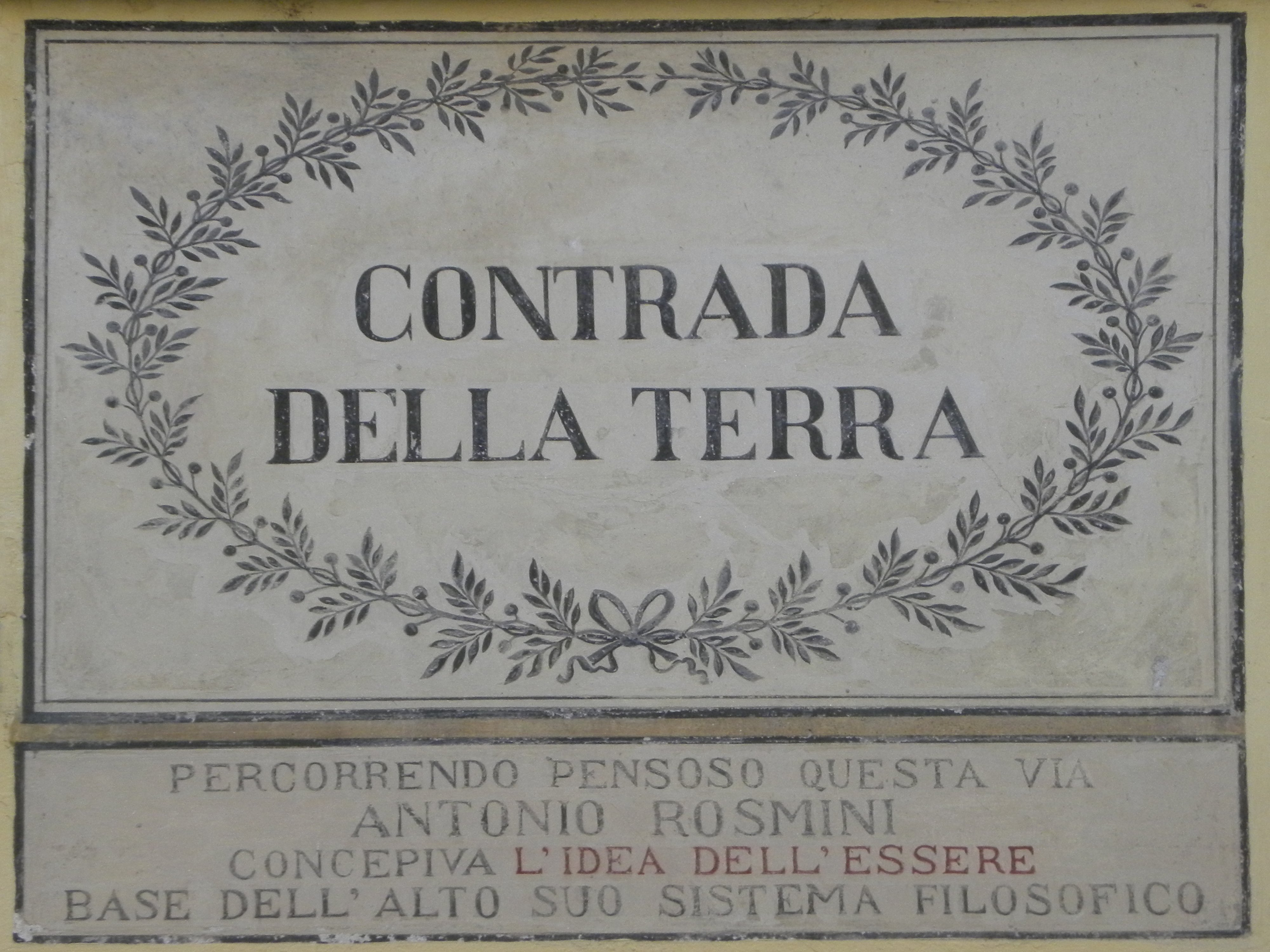 Dipinto murale dedicato ad Antonio Rosmini e situato in via della Terra a Rovereto (TN)